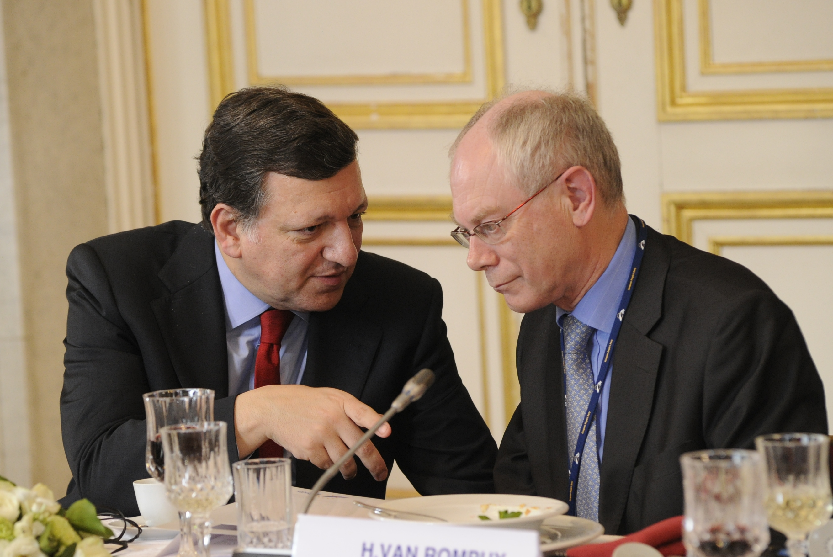 EPP Summit March 2010